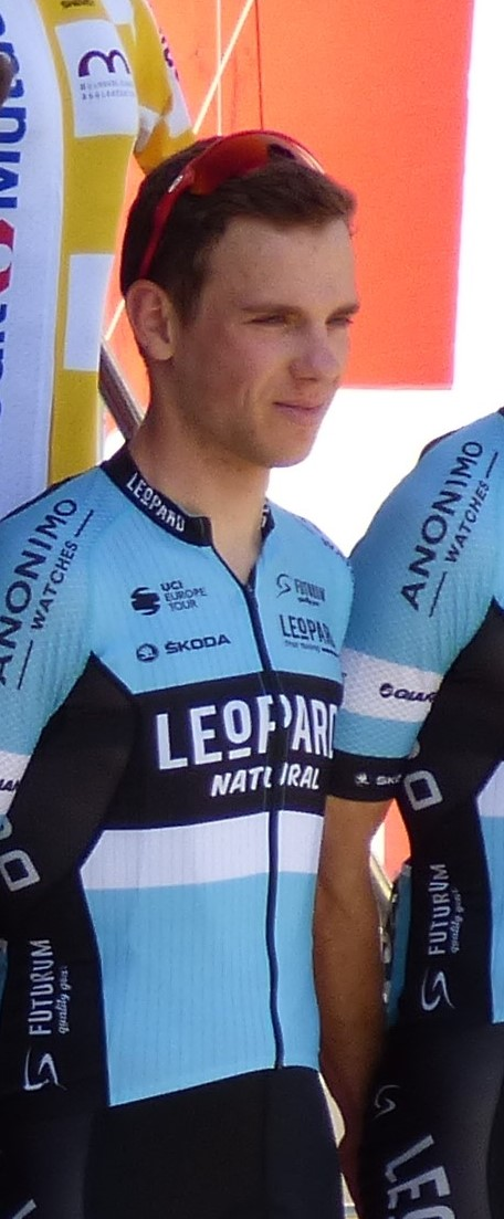 Pit Leyder lors du Tour Alsace 2019